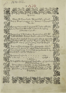 Обложка "Истории" Абраама Кретаци, армянского историка